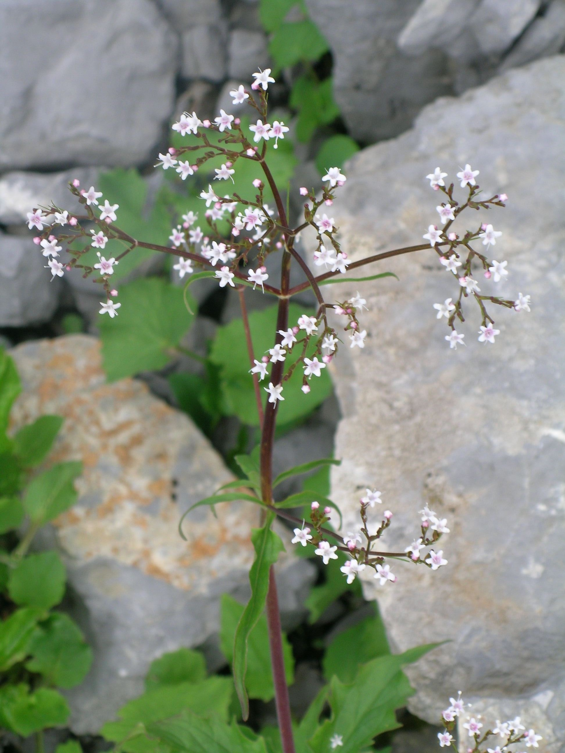 Valeriana tripteris, Schynige Platte, Kanton Bern, Schweiz